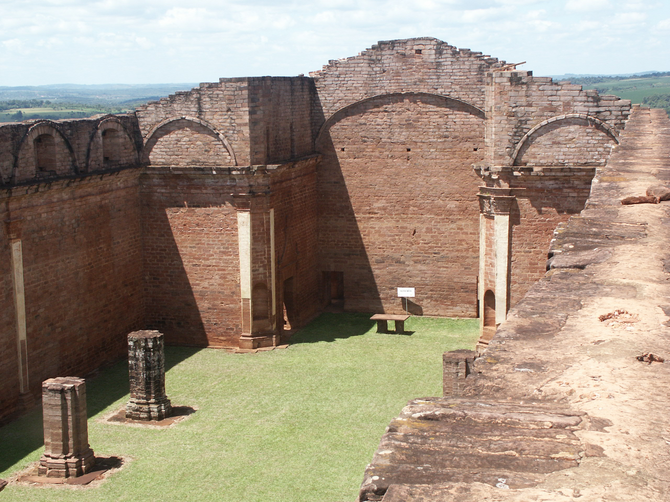 パラグアイの世界遺産ラ・サンティシマ・トリニダー・デ・パラナとヘスース・デ・タバランゲのイエズス会伝道所群のうち、ヘスース・デ・タバランゲの教会跡